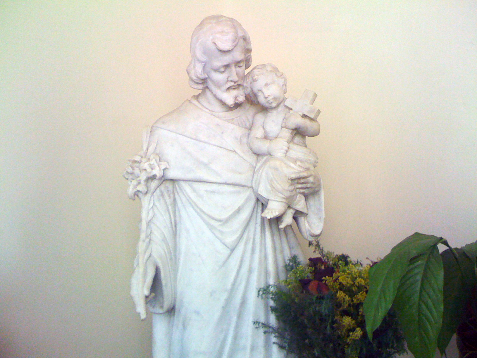 Imagen Religiosa Iglesia Libanes San Chárbel Caracas Iglesia : San Chárbel Makhlouf